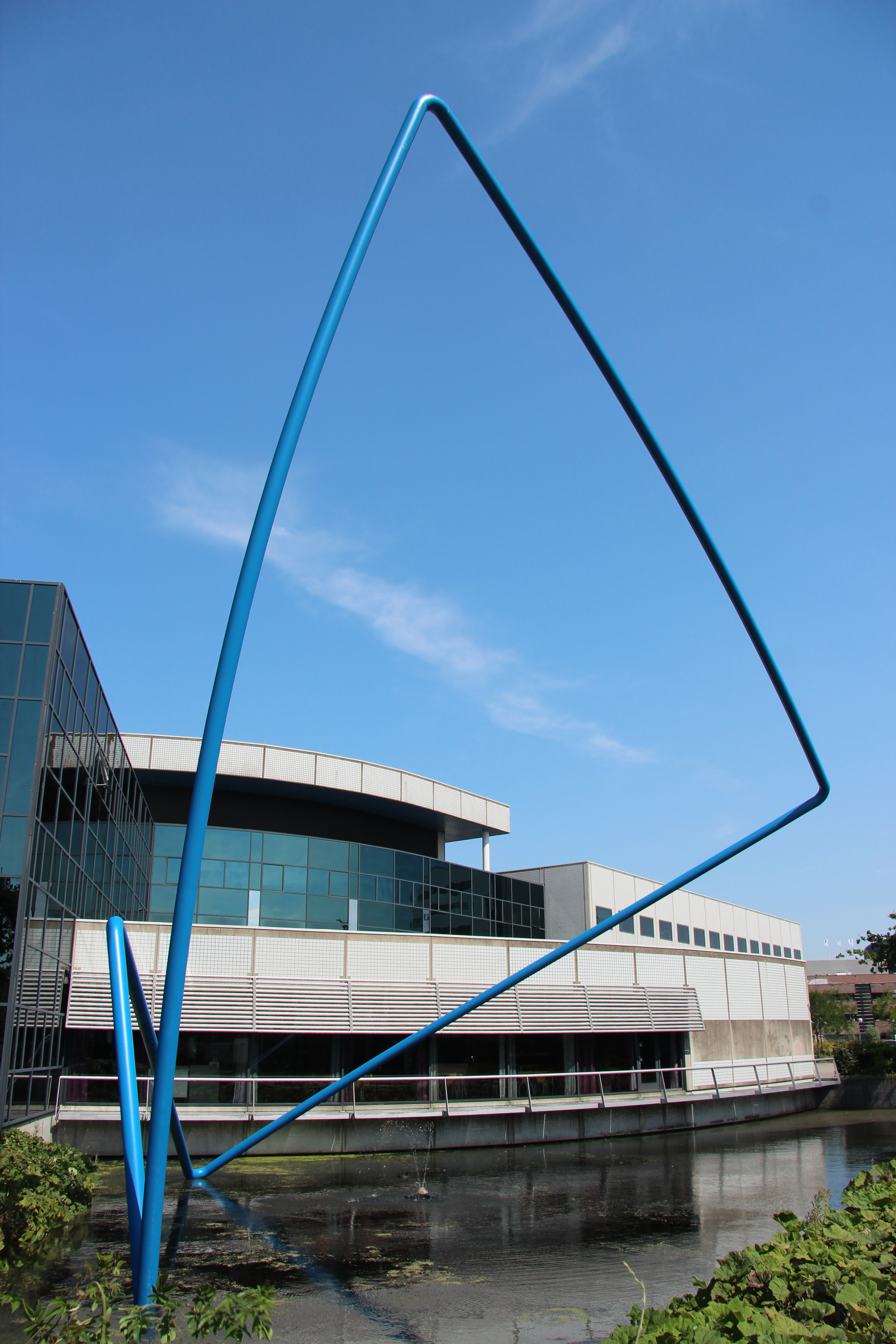 Kunstwerk voor het Gaubius-gebouw van TNO, Zernikedreef Leiden - waarschijnlijk geplaatst in 1989.